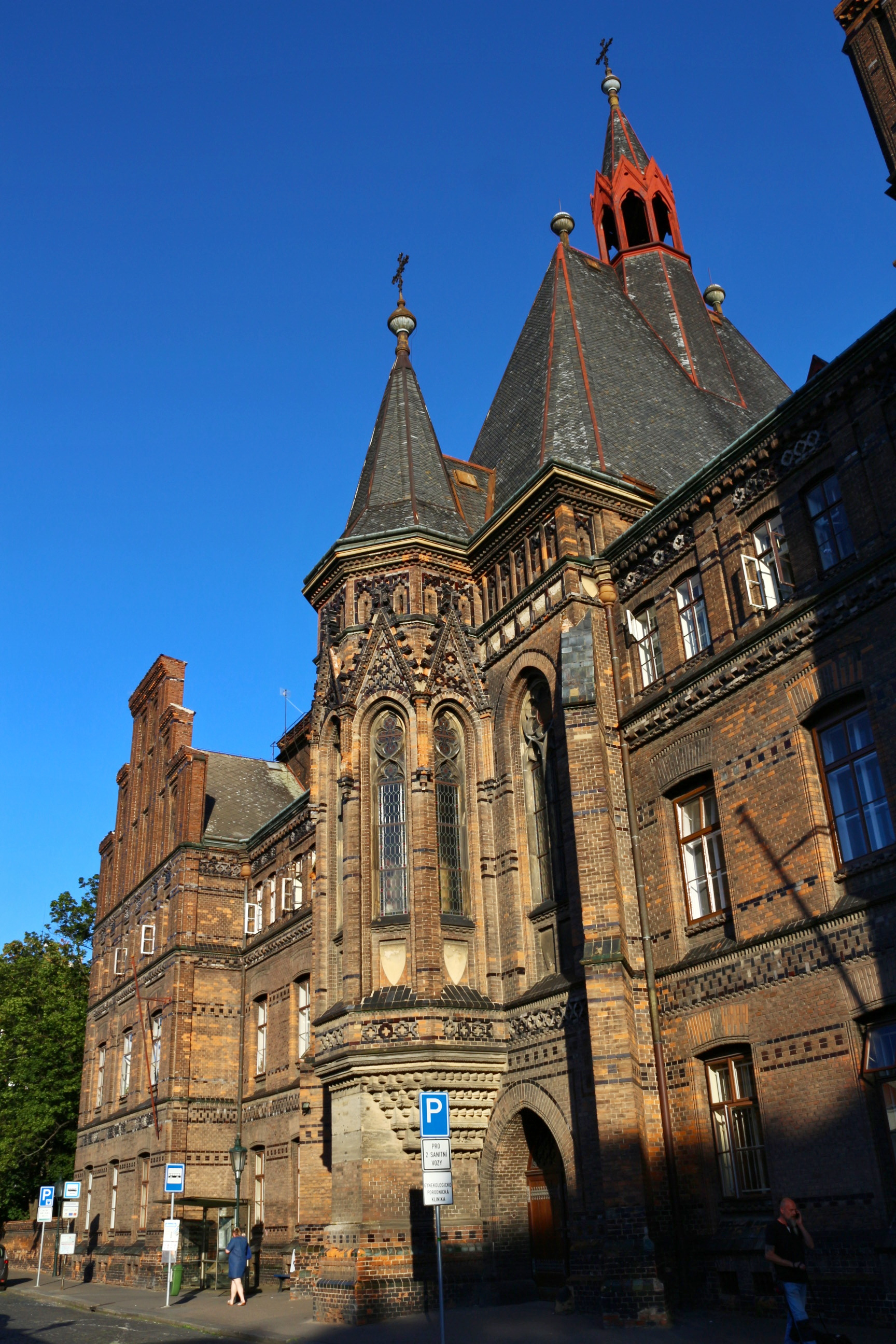 Praha, porodnice u Apolináře